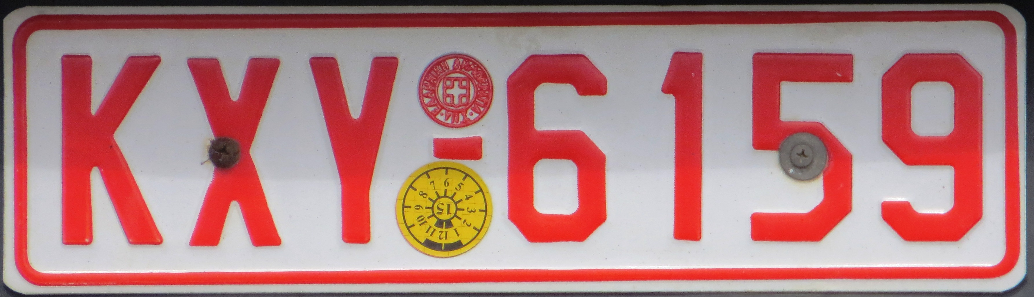 Grieks kentekenplaat concessionary